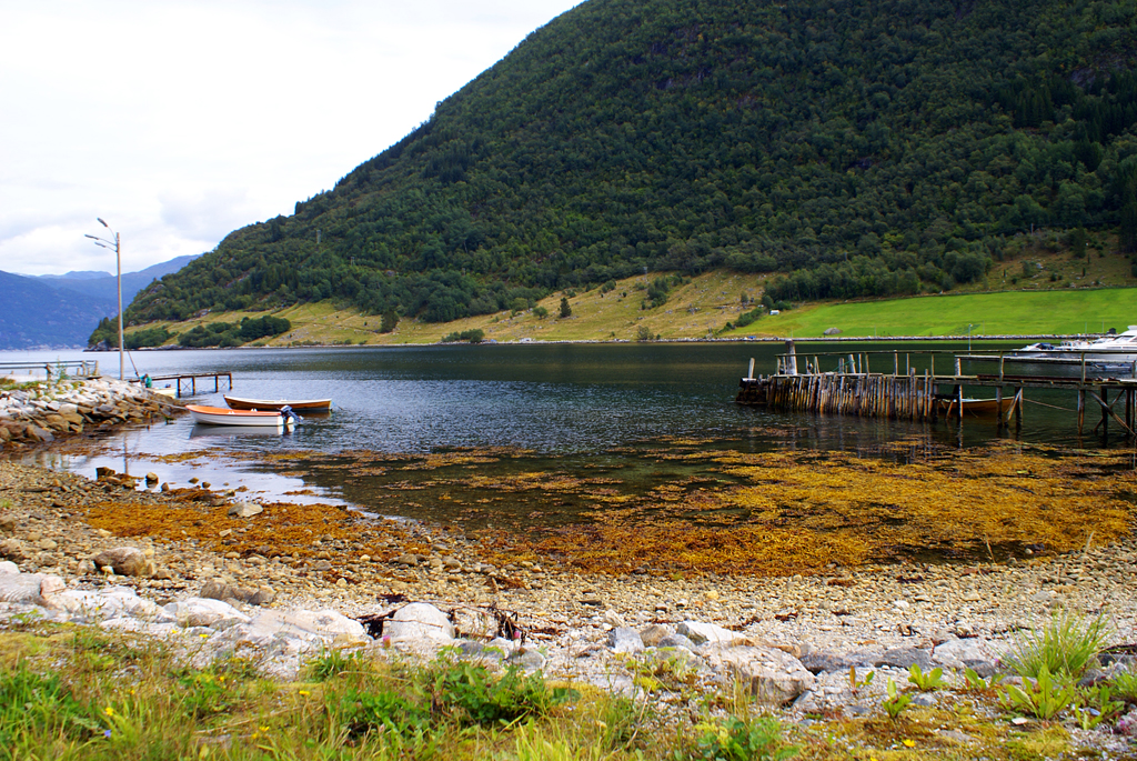 Ornevik in Høyanger municipality, Sogn og Fjordane county, Norway. Original description: Sognefjord